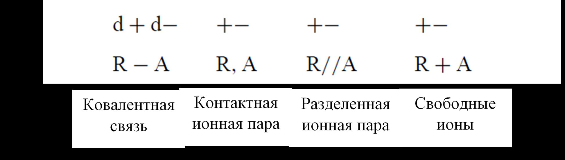 Варианты ионов, которые рассматривались в научной работе Энтони Ледвита